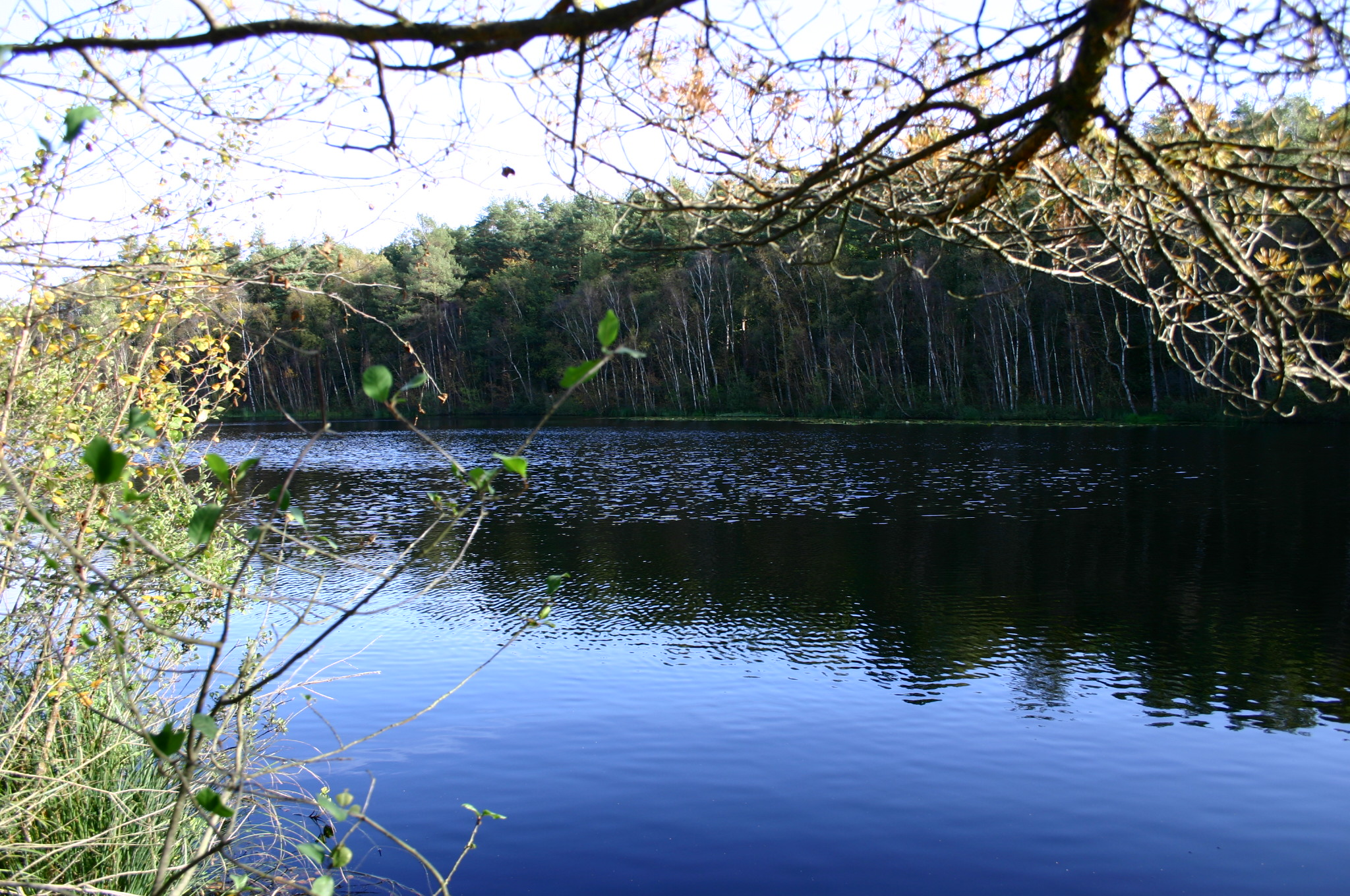 Die Wienpietschseen sind zwei Kesselmoore westlich der Pension Fledermaus, bei Waren (Müritz); Oktober 2012.